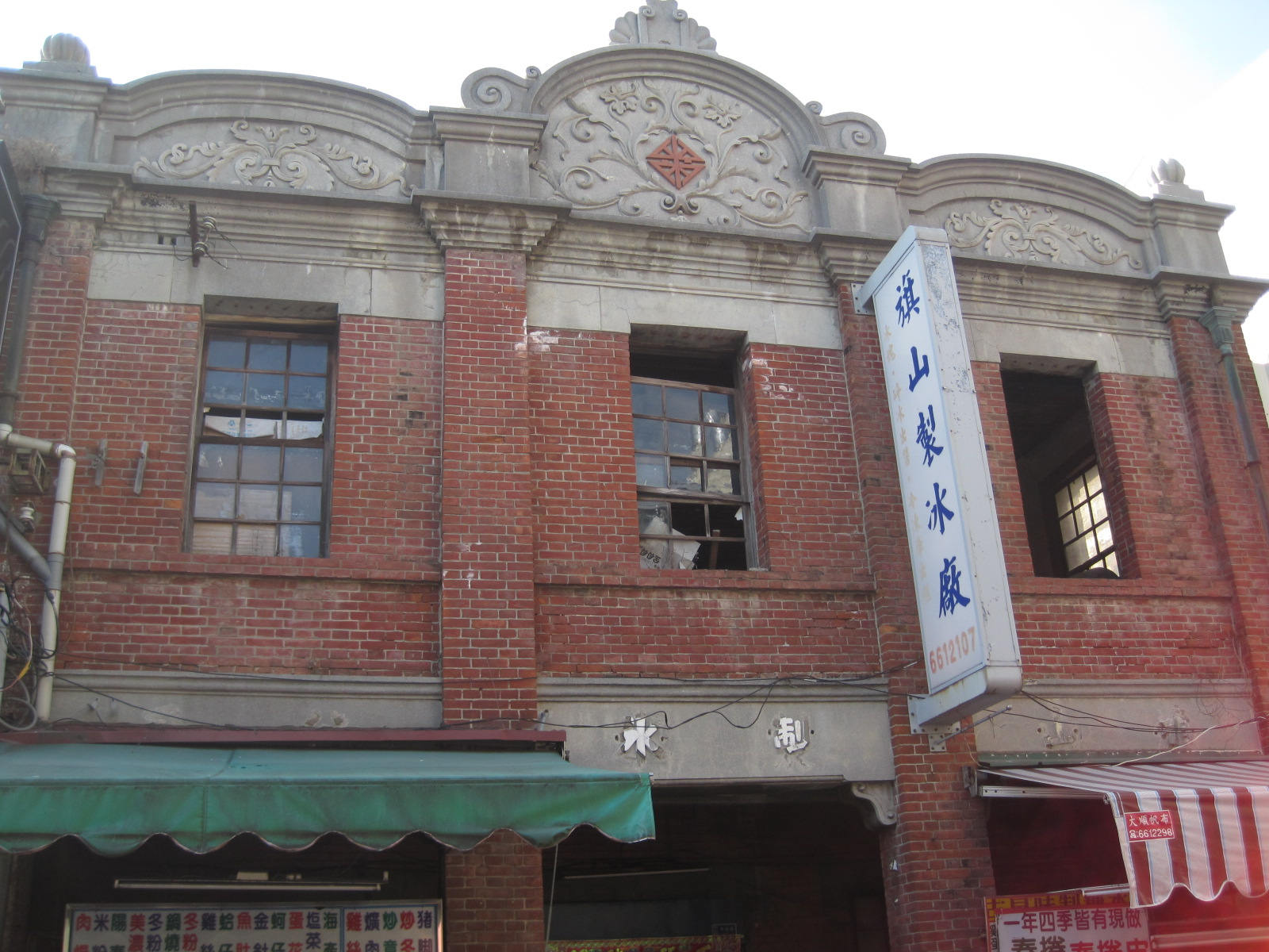 旗山老街街屋──旗山製冰廠